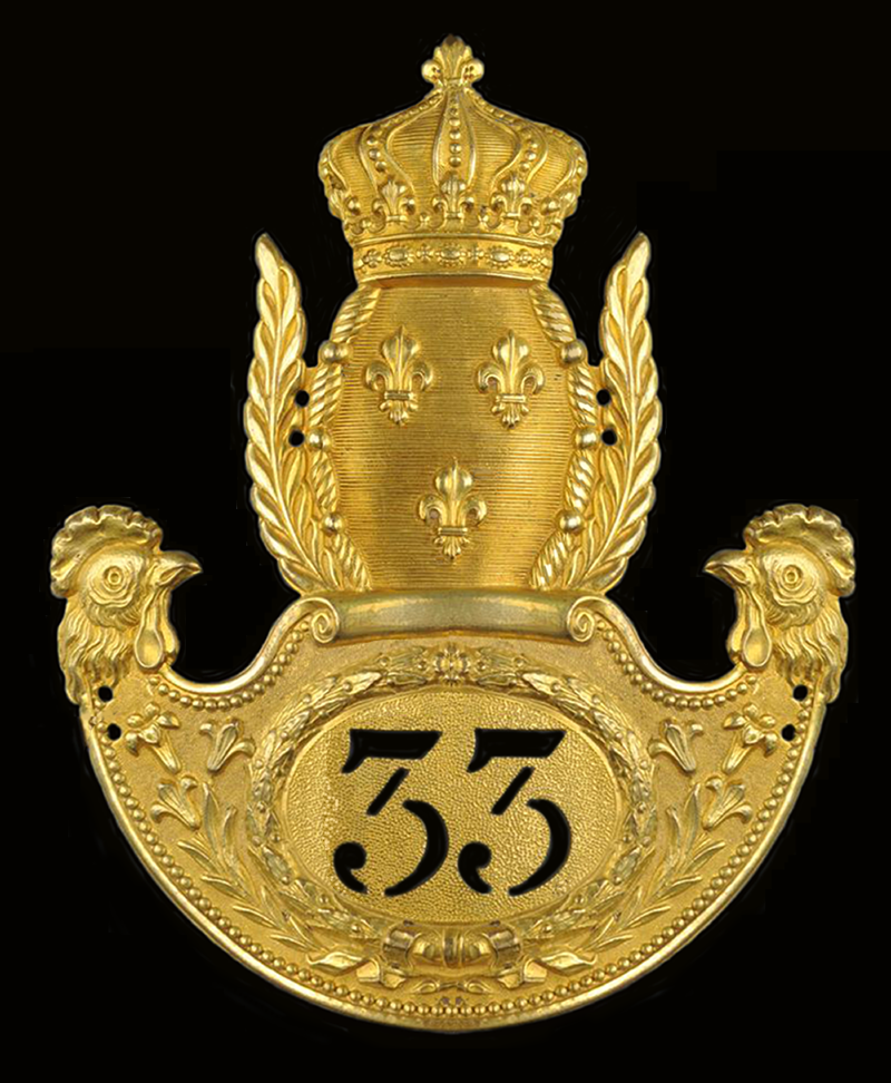 Insigne de czako d'un officier royale du 33e régiment d'infanterie aprés 1915